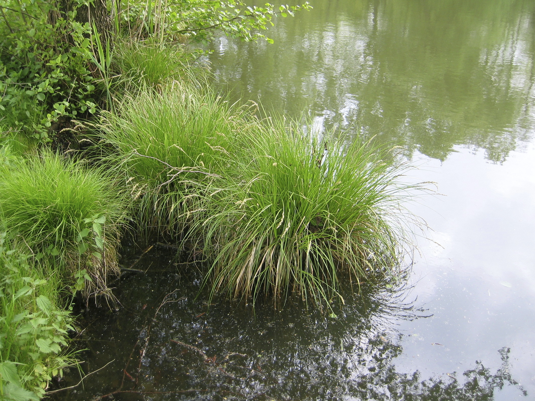 Bulte der Rispen-Segge (Carex paniculata) am Ufer des Fischteichs im NSG Kiebitzteich, Reelsen, Bad Driburg, Deutschland.